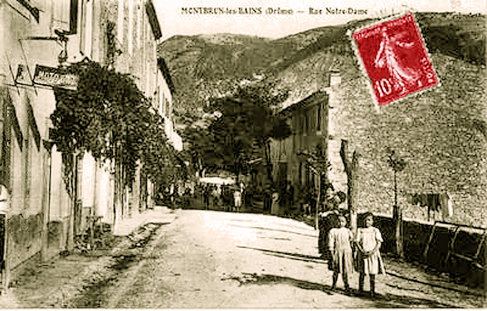 Montbrun-les-Bains rue Notre-Dame